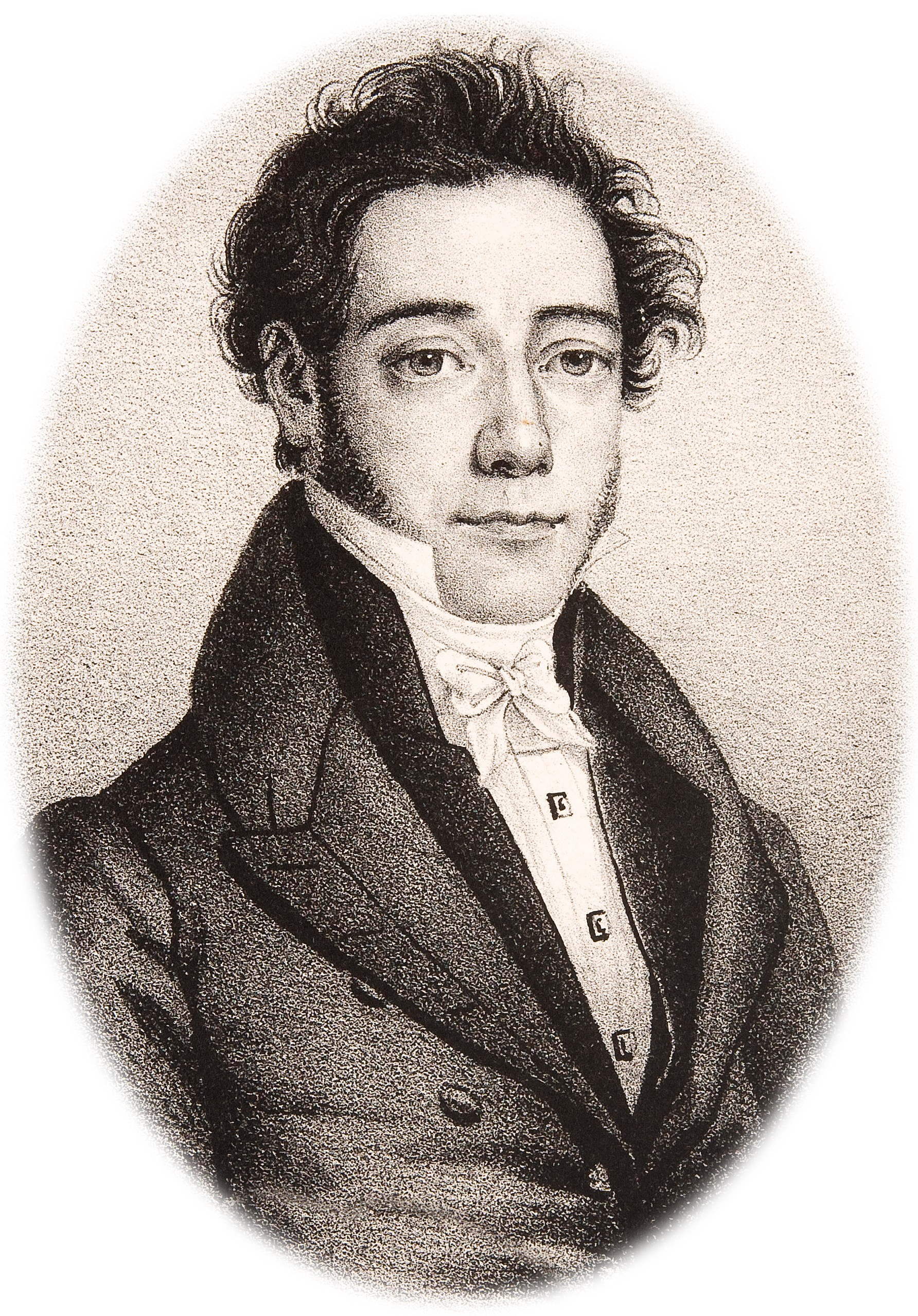 Retrato de Antonio González que forma parte del grabado titulado: "Señores Procuradores del Reino en las Cortes Generales de la legislatura de 1834"